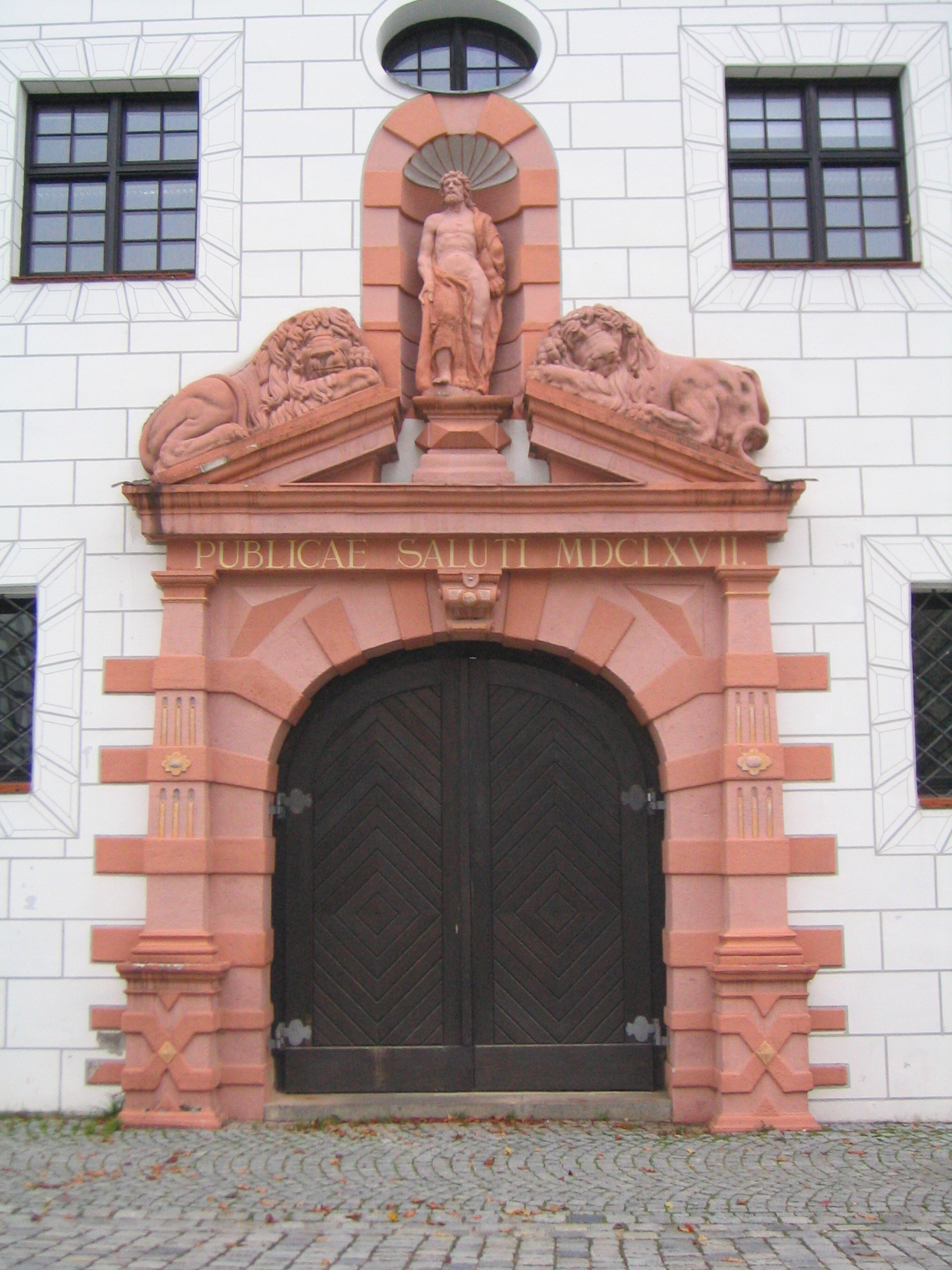 Westliches Portal des Ulmer Zeughauses